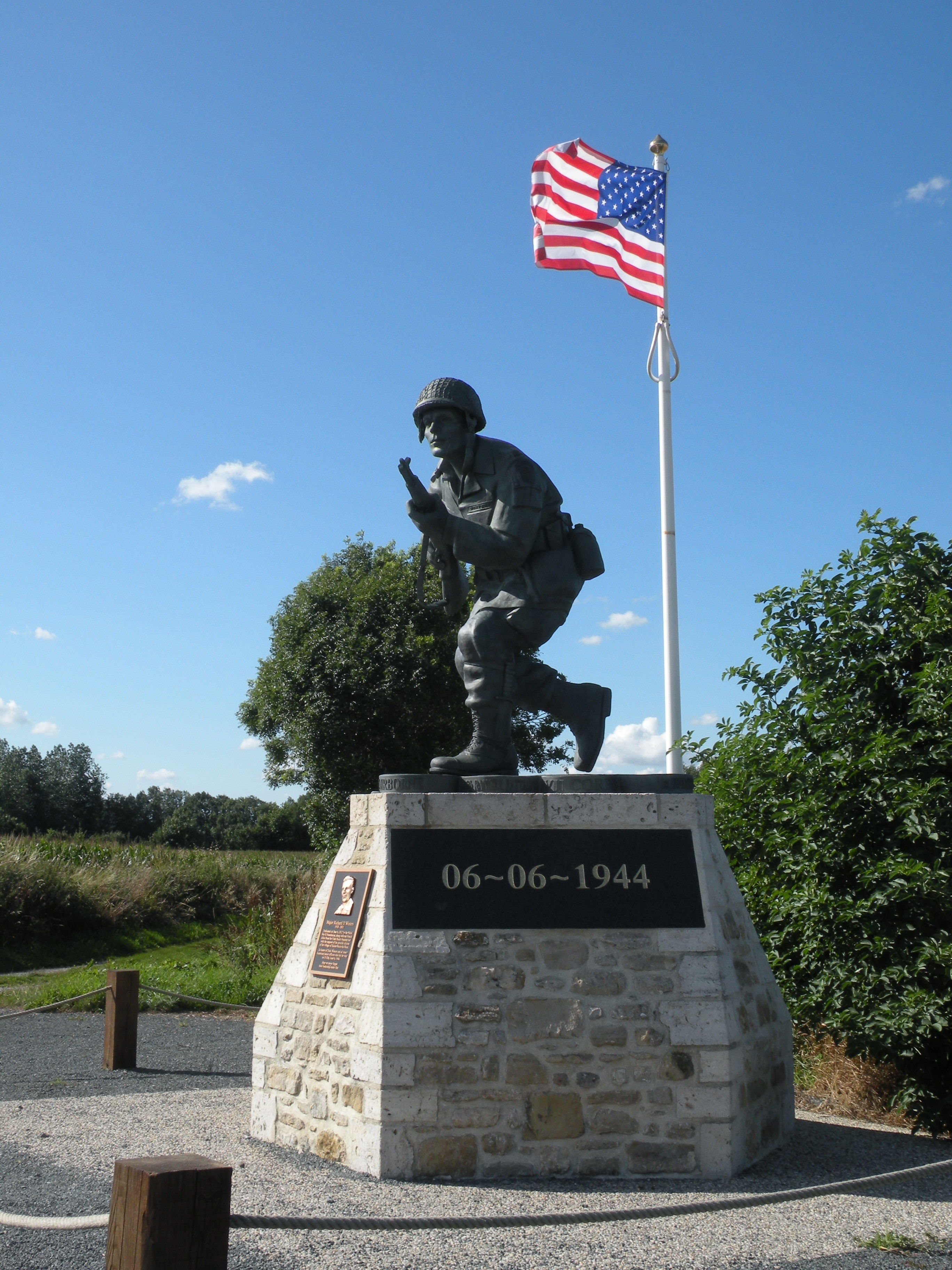 mémorial Richard Winters à Utah Beach